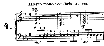 Compassos iniciais do primeiro movimento da Sonata Op. 7 de Beethoven